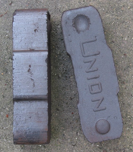 zelfgemaakte fot o van bruinkoolbriketten